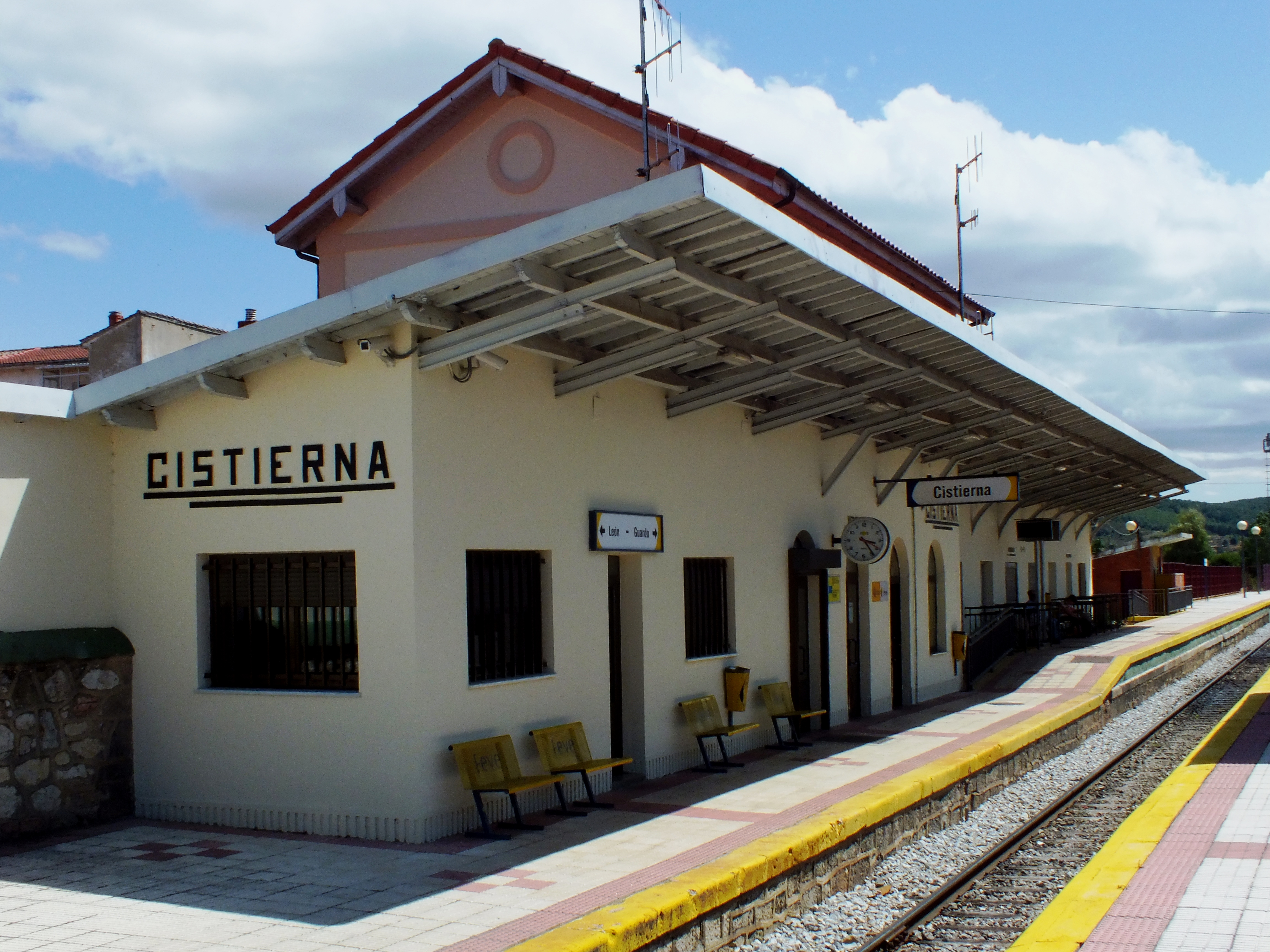 Estación de Cistierna (León, España)